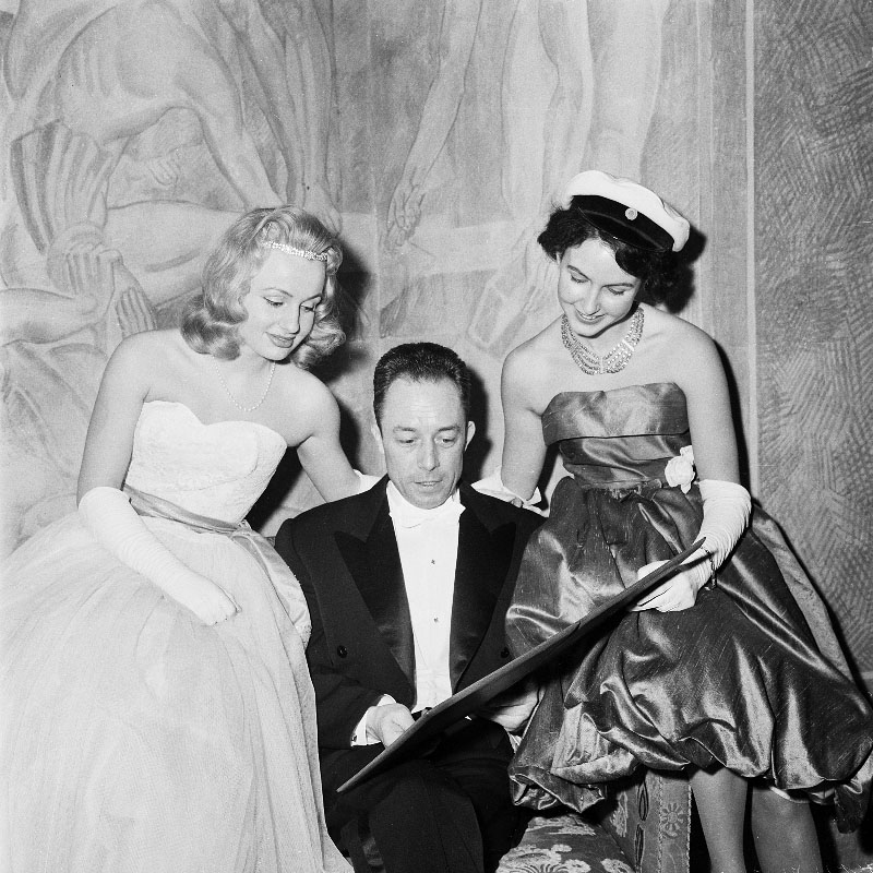 Stockholms Stadshus. Nobelpristagaren i litteratur Albert Camus i samtal med två unga kvinnor på Nobelfesten, möjligen framför Törnemans freskomålning.